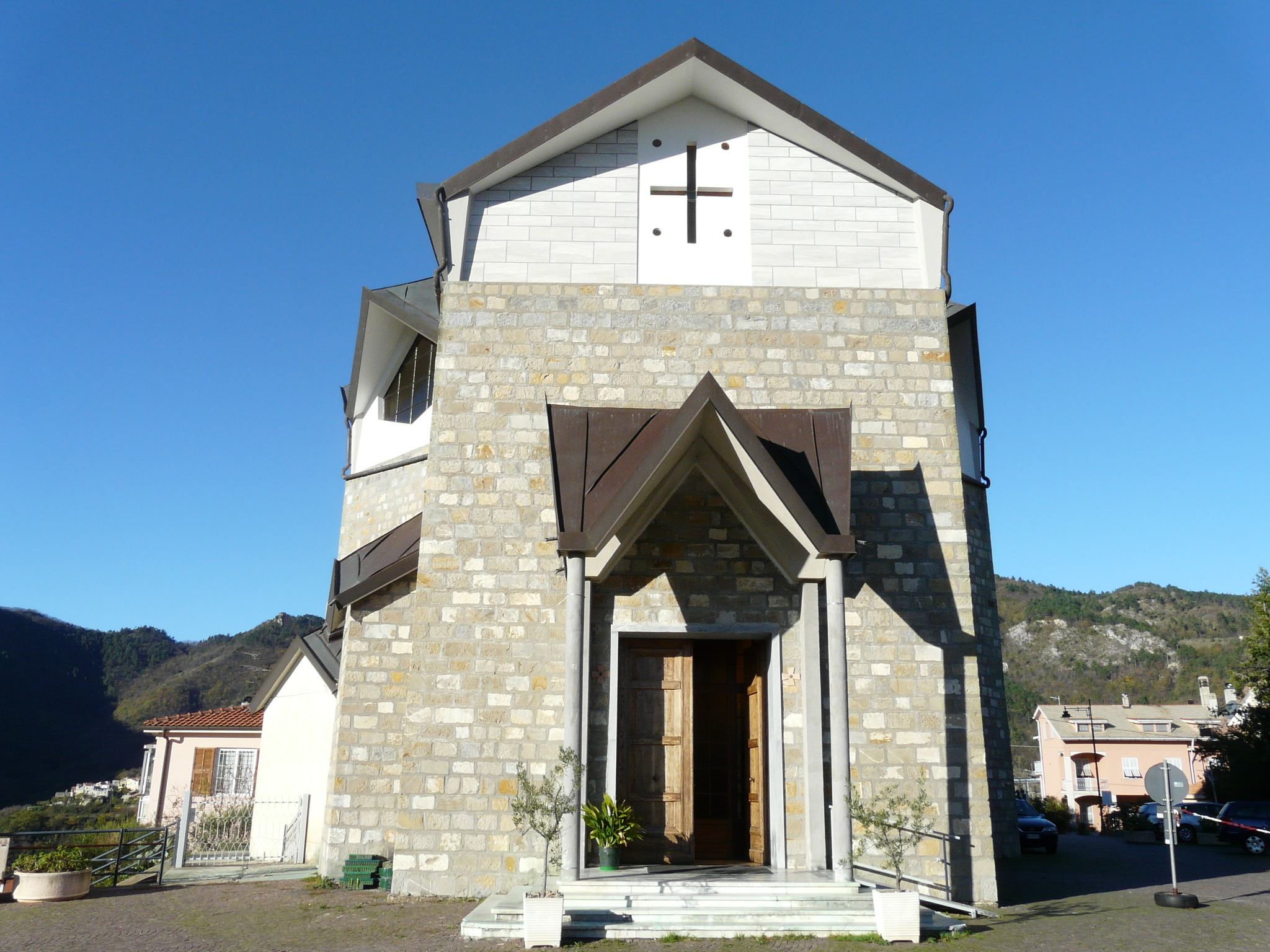 Chiesa parrocchiale di Sant'Andrea presso il moderno abitato di Balestrino, Liguria, Italia